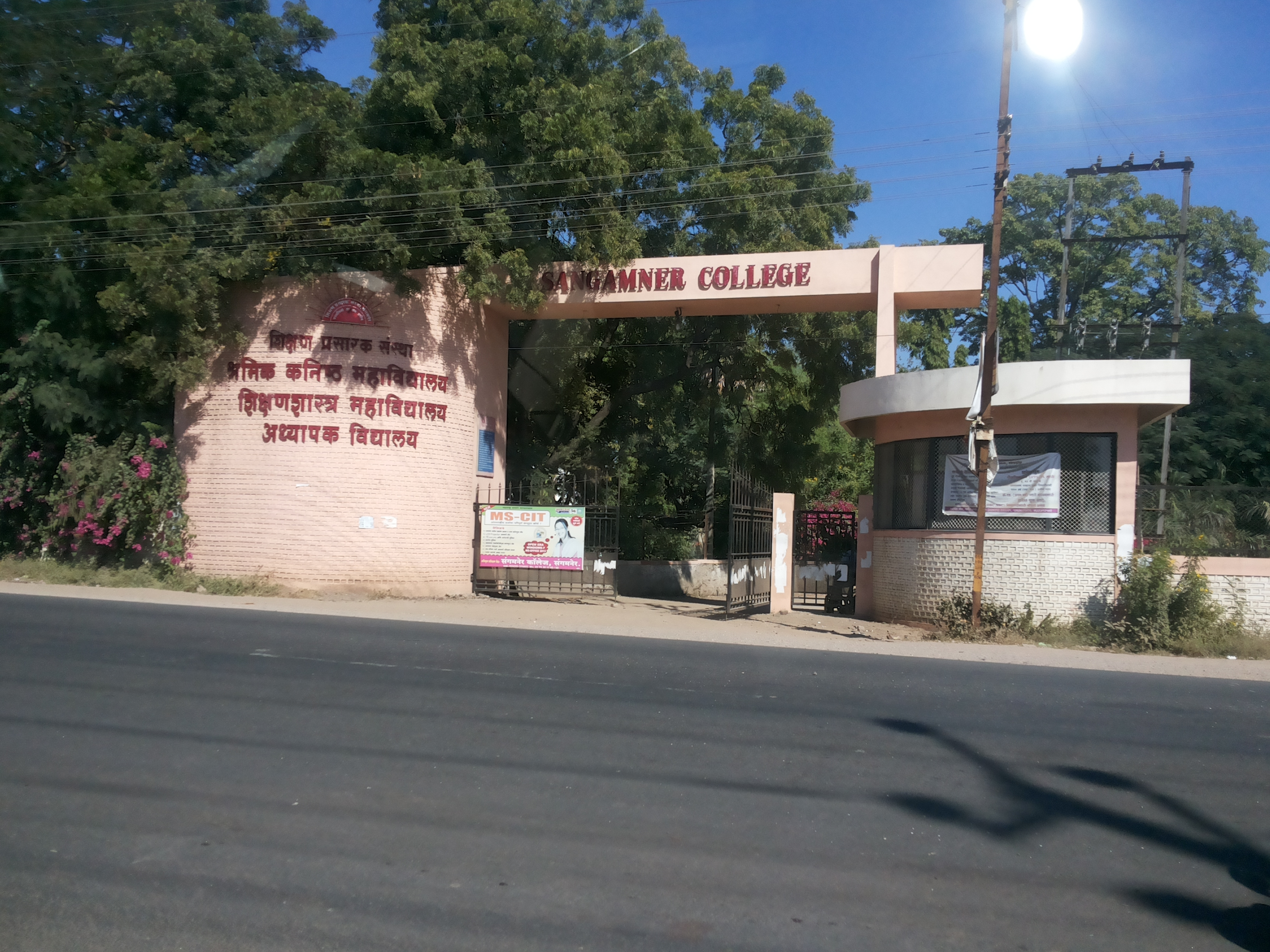 संगमनेर महाविद्यालयाचे प्रवेशद्वार क्रमांक २